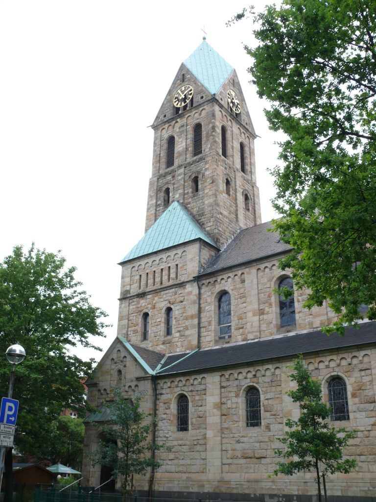 St. Georgskirche